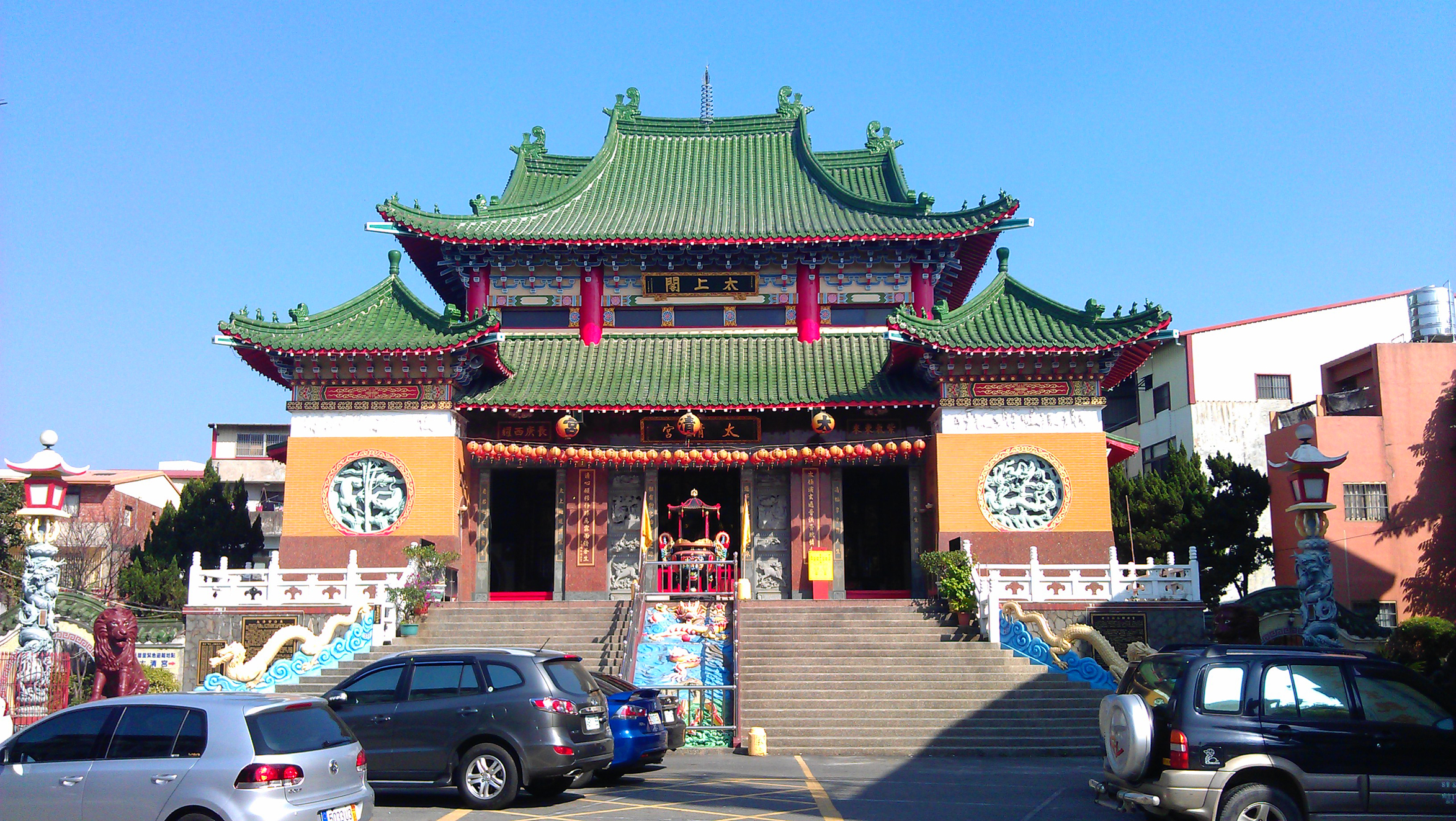 草屯太清宮